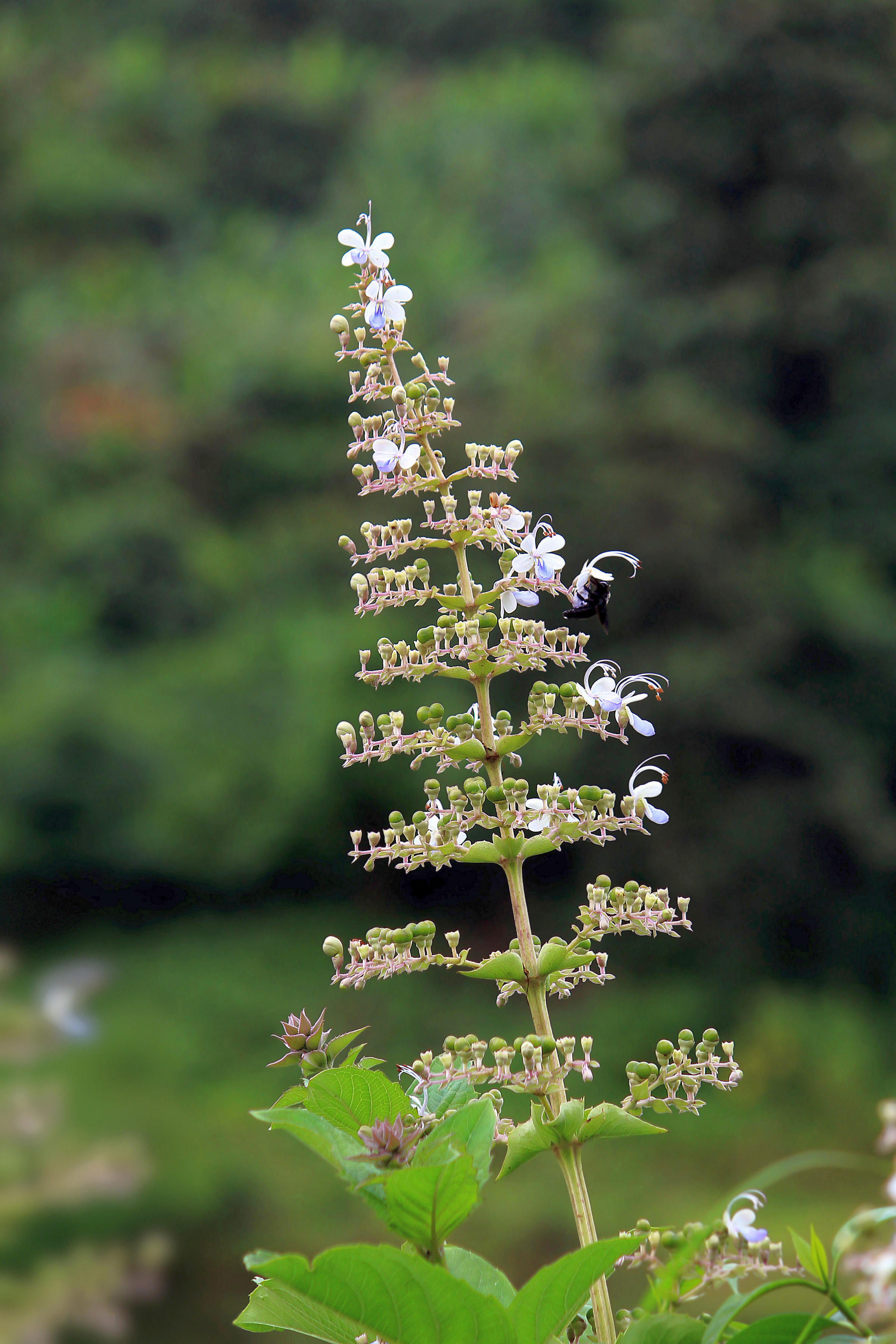 ചെറുതേക്ക്